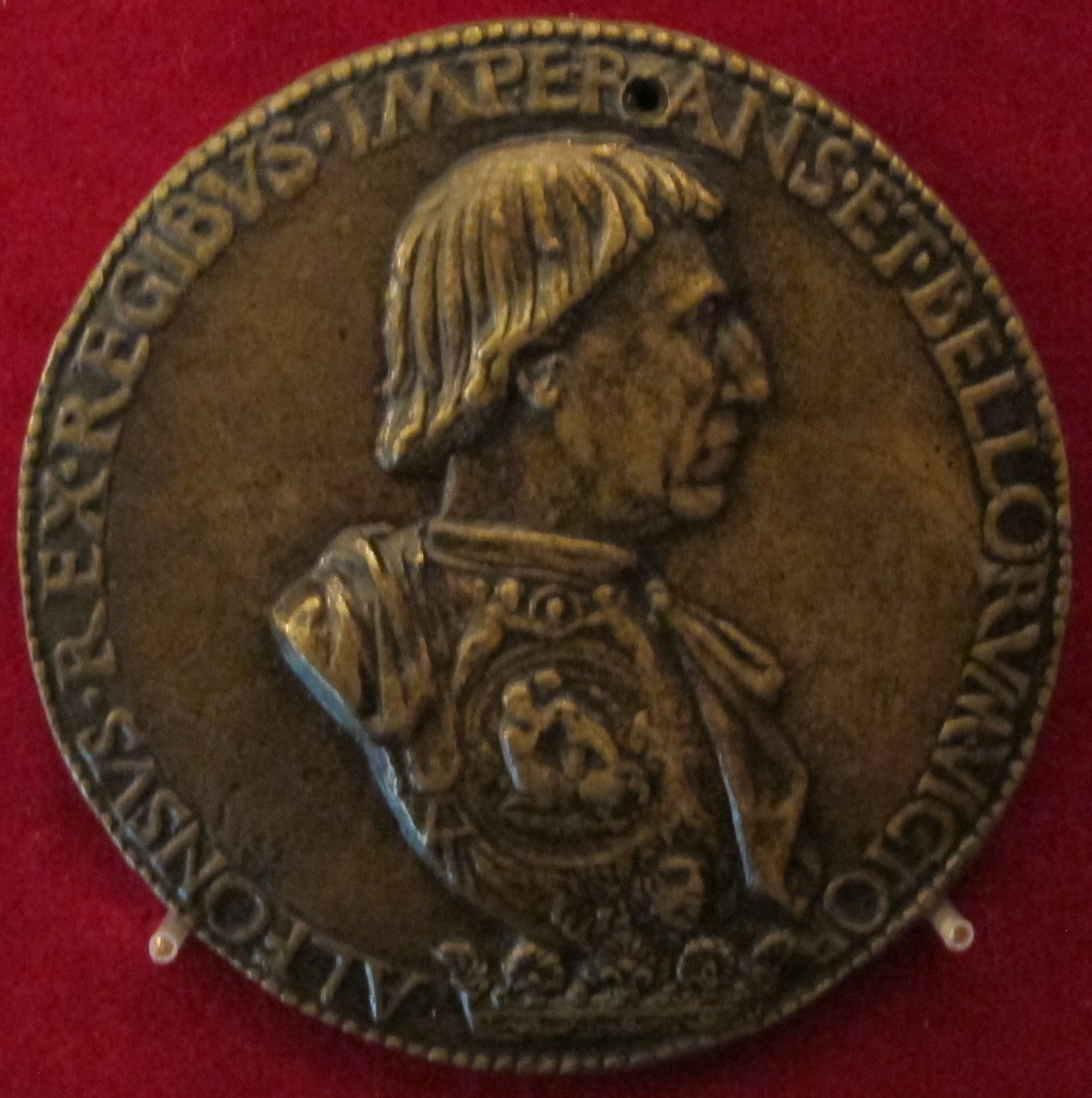 Cristoforo di geremia, alfonso V di napoli, 1456-1476 ca.